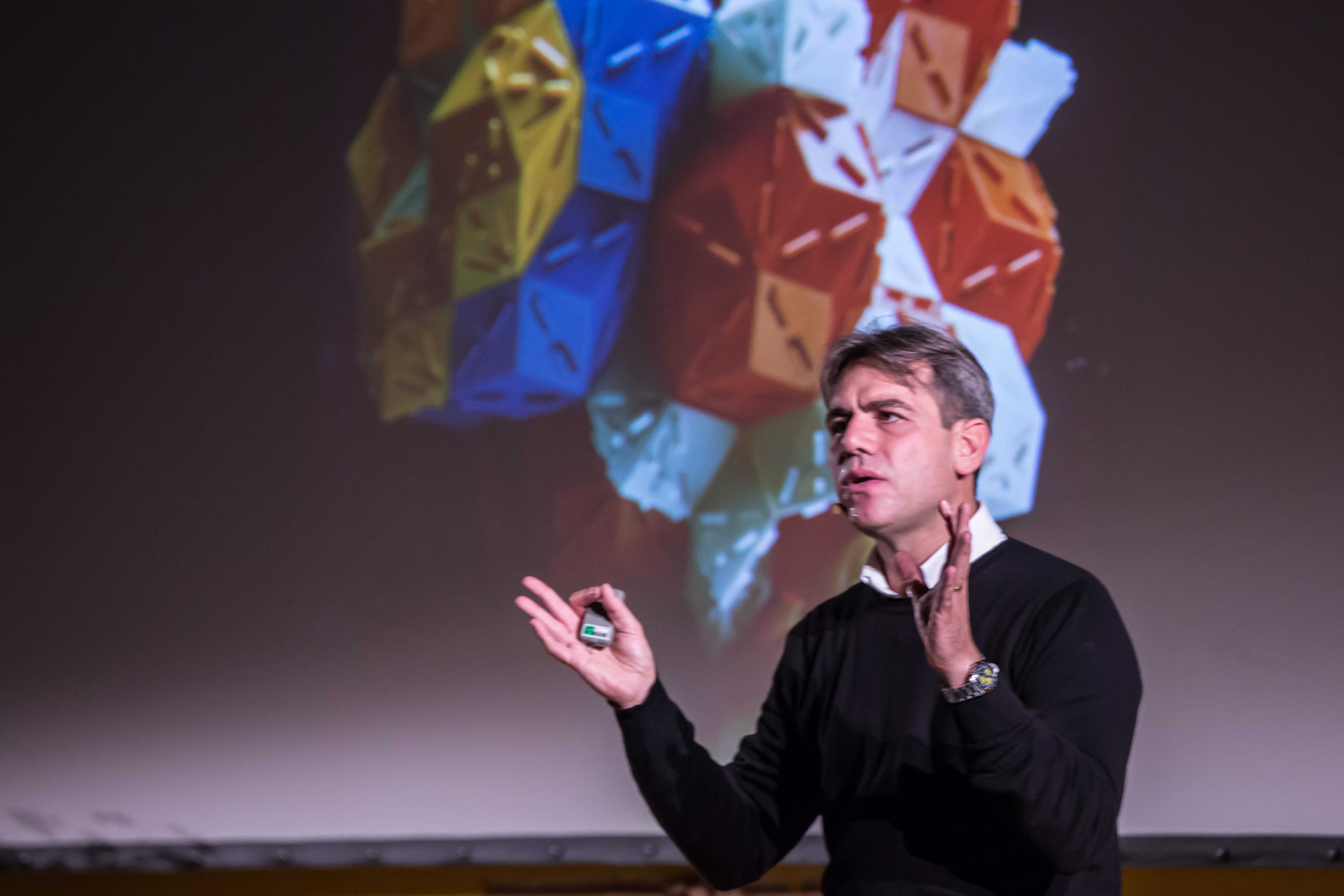 Luca Bindi durante la conferenza sui quasicristalli tenutasi a Tavagnasco il 28 Novembre 2014